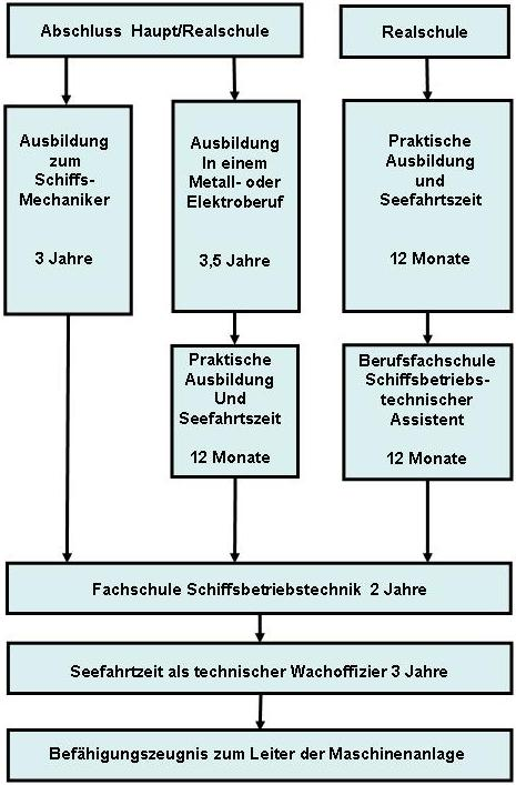 Aktuelle technische Ausbildung an einer Fachschule zum Leiter der Maschinenanlage